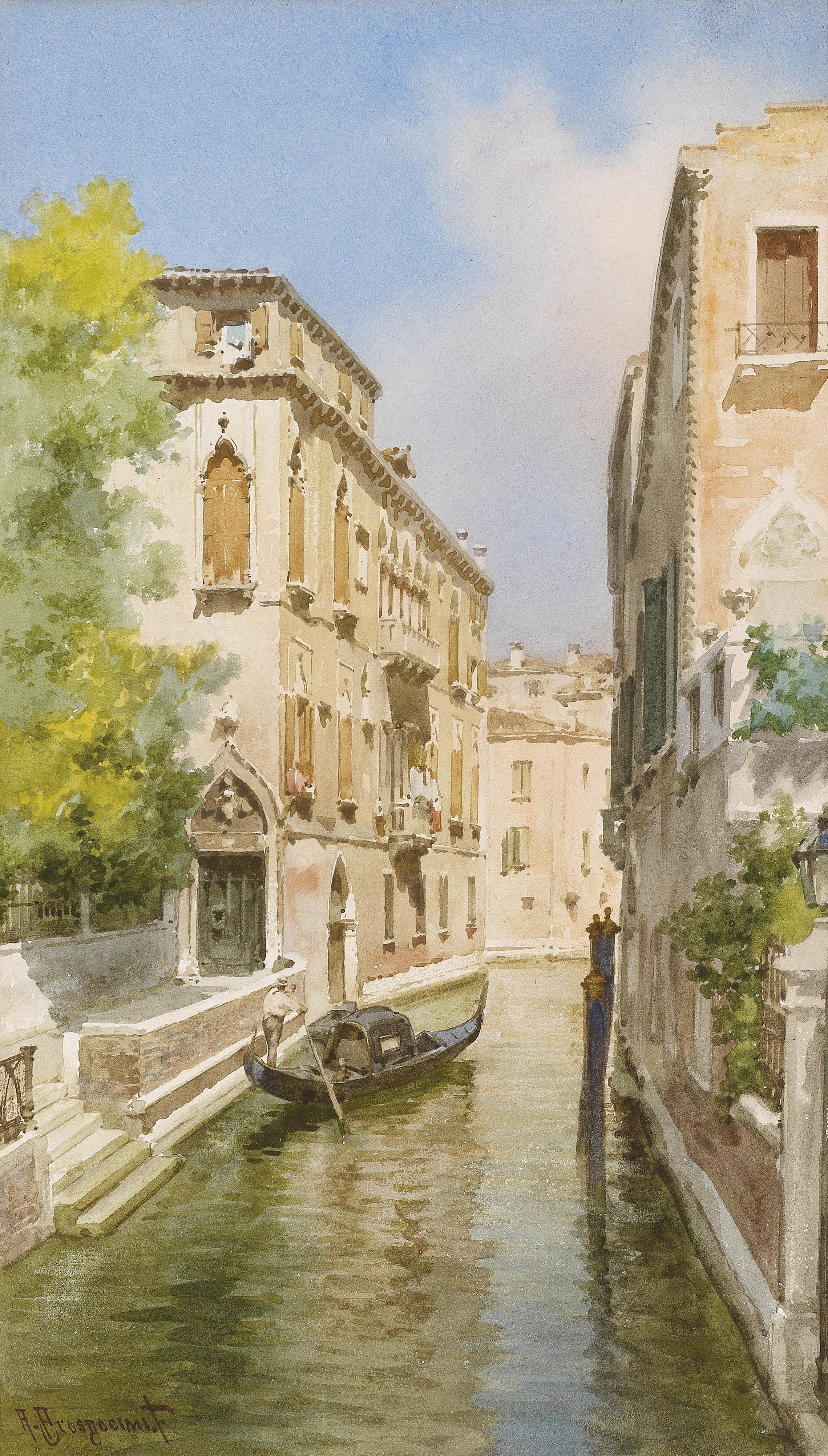 Blick auf den Dogenpalast